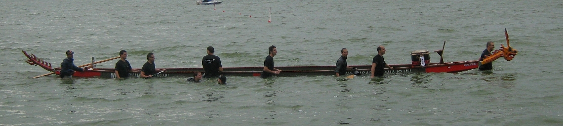 Sárkányhajó borulás után (Tata, Öreg-tó)